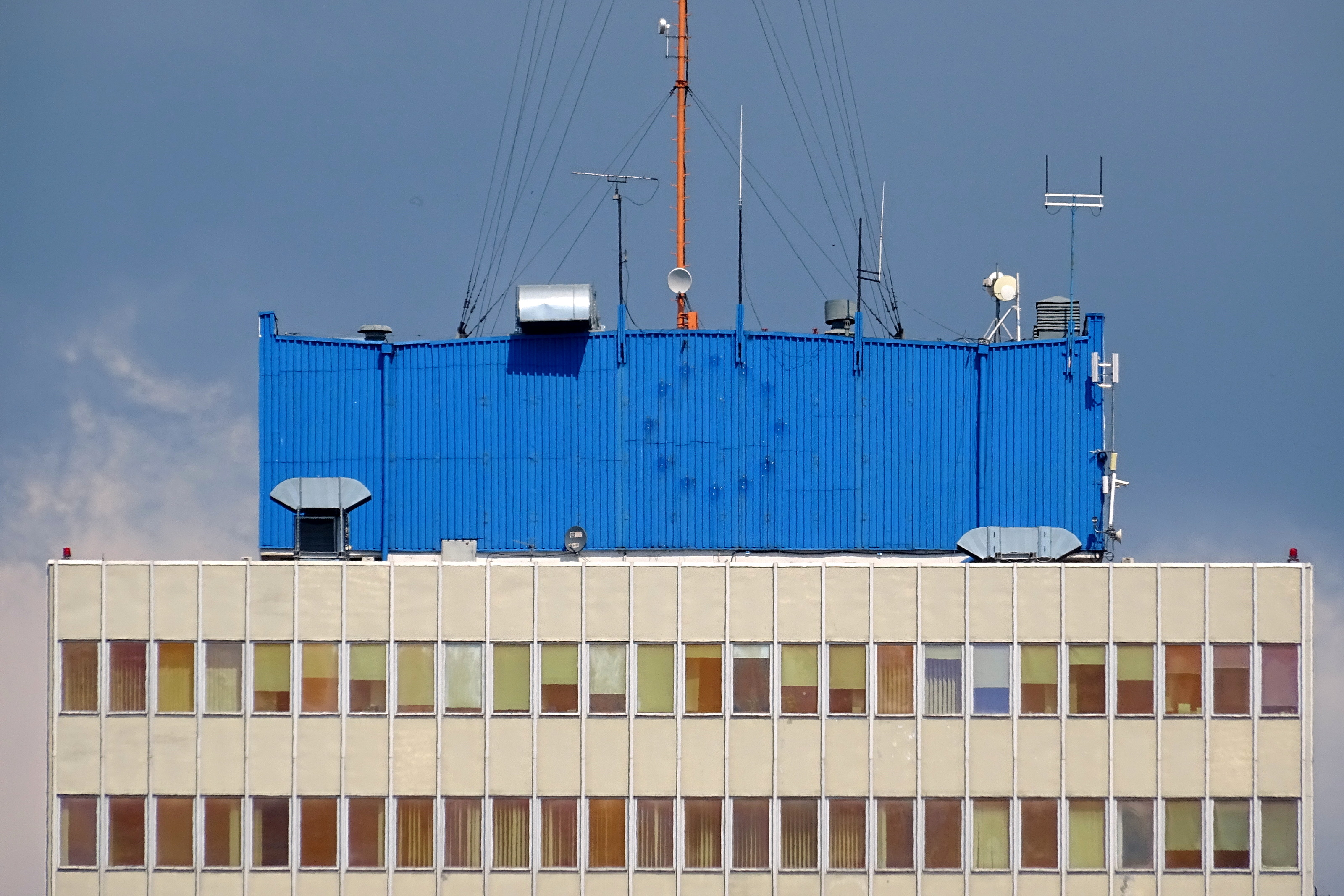 Lubuski Urząd Wojewódzki w Gorzowie Wlkp. - widoczne ślady po zdemontowanych gwiazdkach flagi unijnej. Po wstąpieniu Polski do Unii Europejskiej ówcześni włodarze województwa lubuskiego zaakcentowali ten fakt pomalowaniem kondygnacji technicznej budynku w unijne barwy. Z wnioskiem o usunięcie umieszczonych tam gwiazdek wystąpił szef regionu NSZZ "Solidarność" Jarosław Porwich (od 2015 r. poseł Kukiz'15). Dopiero po 11 latach - w grudniu 2015 r., po objęciu rządów przez "PiS" - je zdemontowano. Jako powód podano ich zły stan techniczny i, że demontaż był zaplanowany wcześniej.